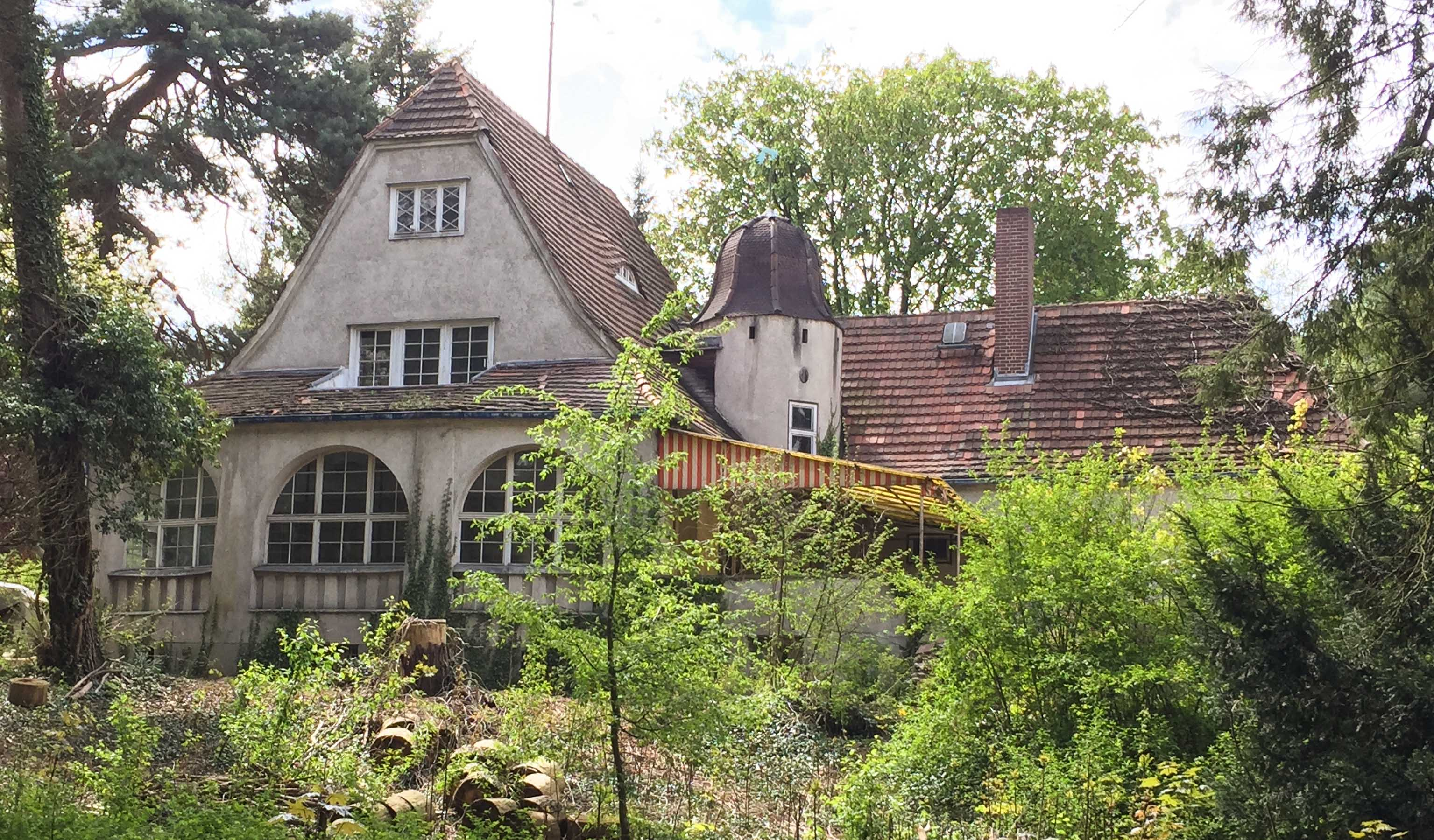 Berlin-Frohnau, Frohnauer Straße 144A, Haus Winkler, 1911, Architekt: Otto Rudolf Salvisberg - Dies ist ein Foto des Berliner Kulturdenkmals mit der Nummer 09011980.